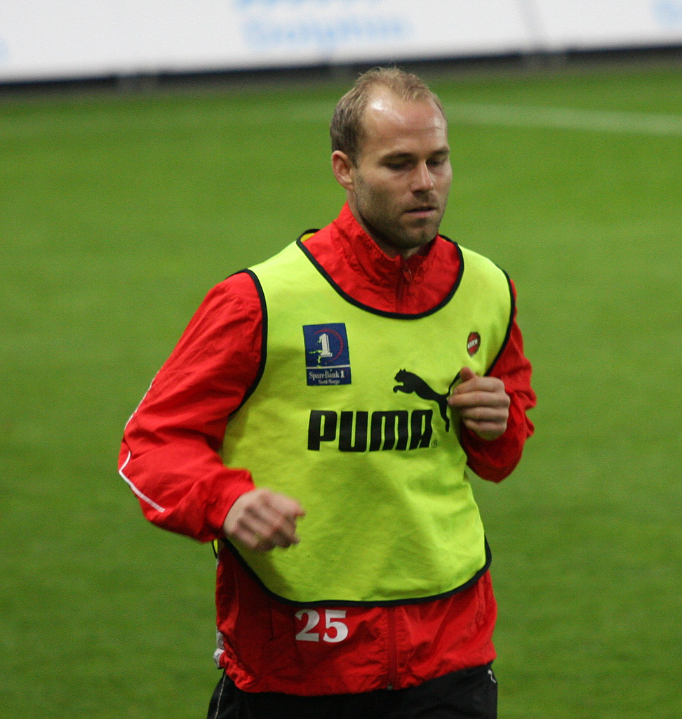 Roger Risholt